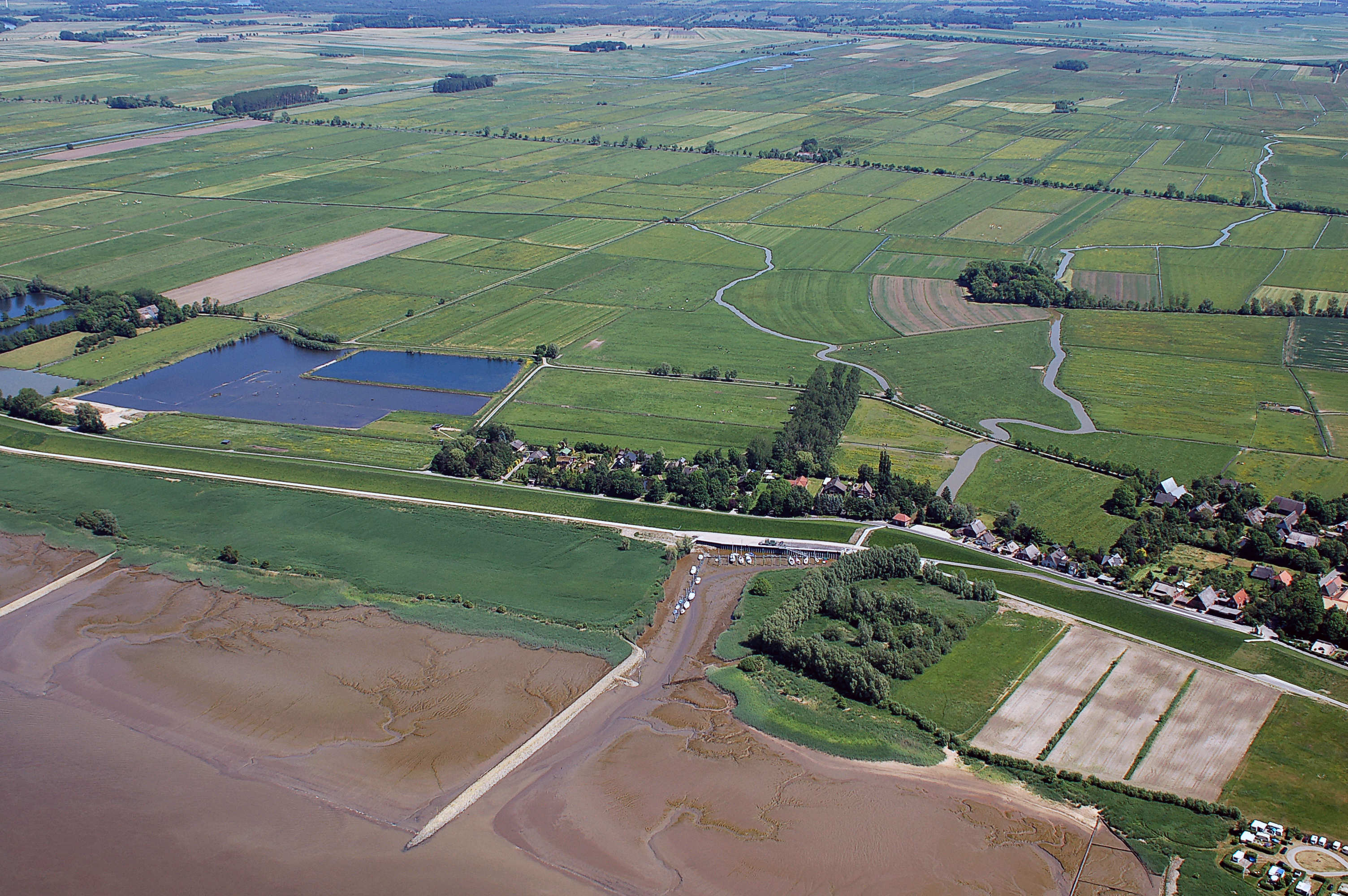 Weserufer und Hinterland bei Rechtenfleth. Luftbilder von der Nordseeküste 2012-05